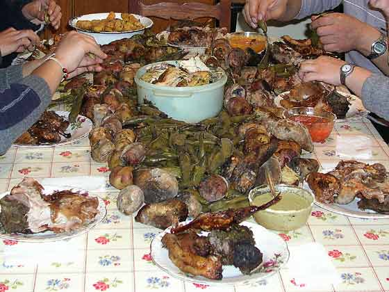 Pachamanca, en la mesa comiendo.